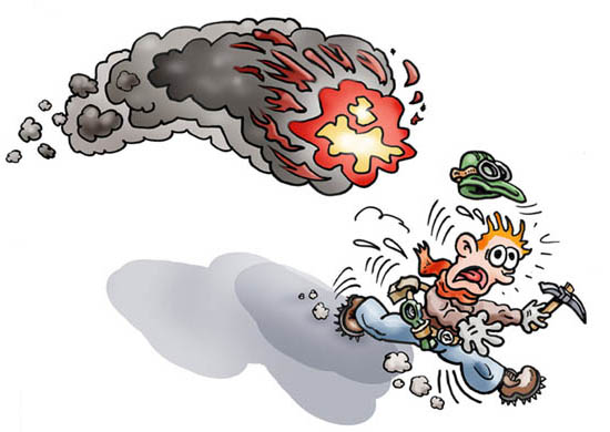 Door Peter Welleman, voor het Teyler Museum in Haarlem.